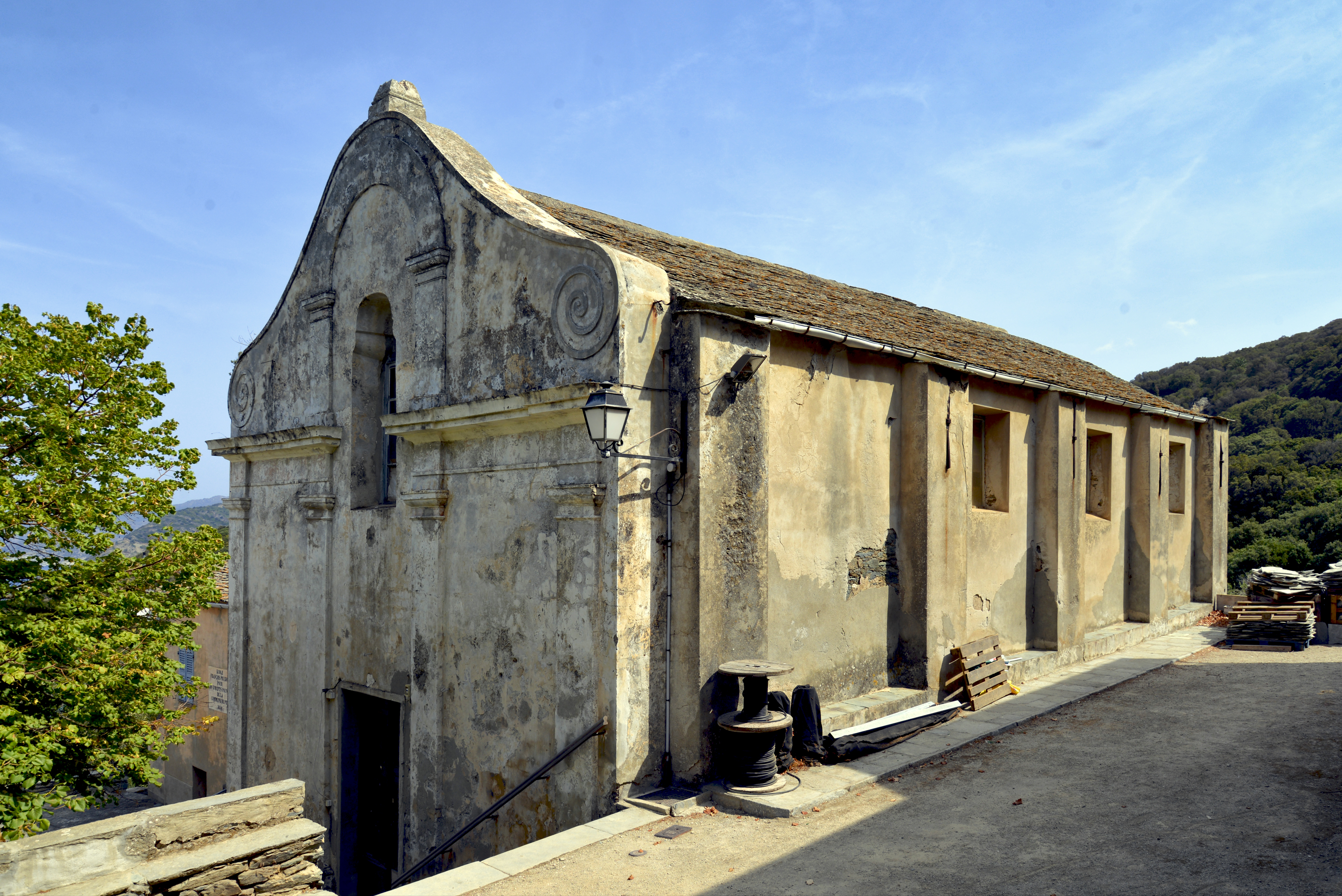 Pino, Cap Corse (Haute-Corse) - La chapelle de confrérie Saint-Croix (Santa Croce), à proximité de l'église paroissiale Notre-Dame-de-l'Assomption (Santa Maria Assunta).